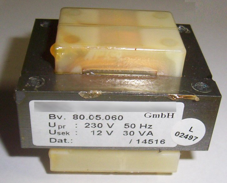 Kleiner Trafo für 12 Volt und 30 VA. Hersteller: Light Division